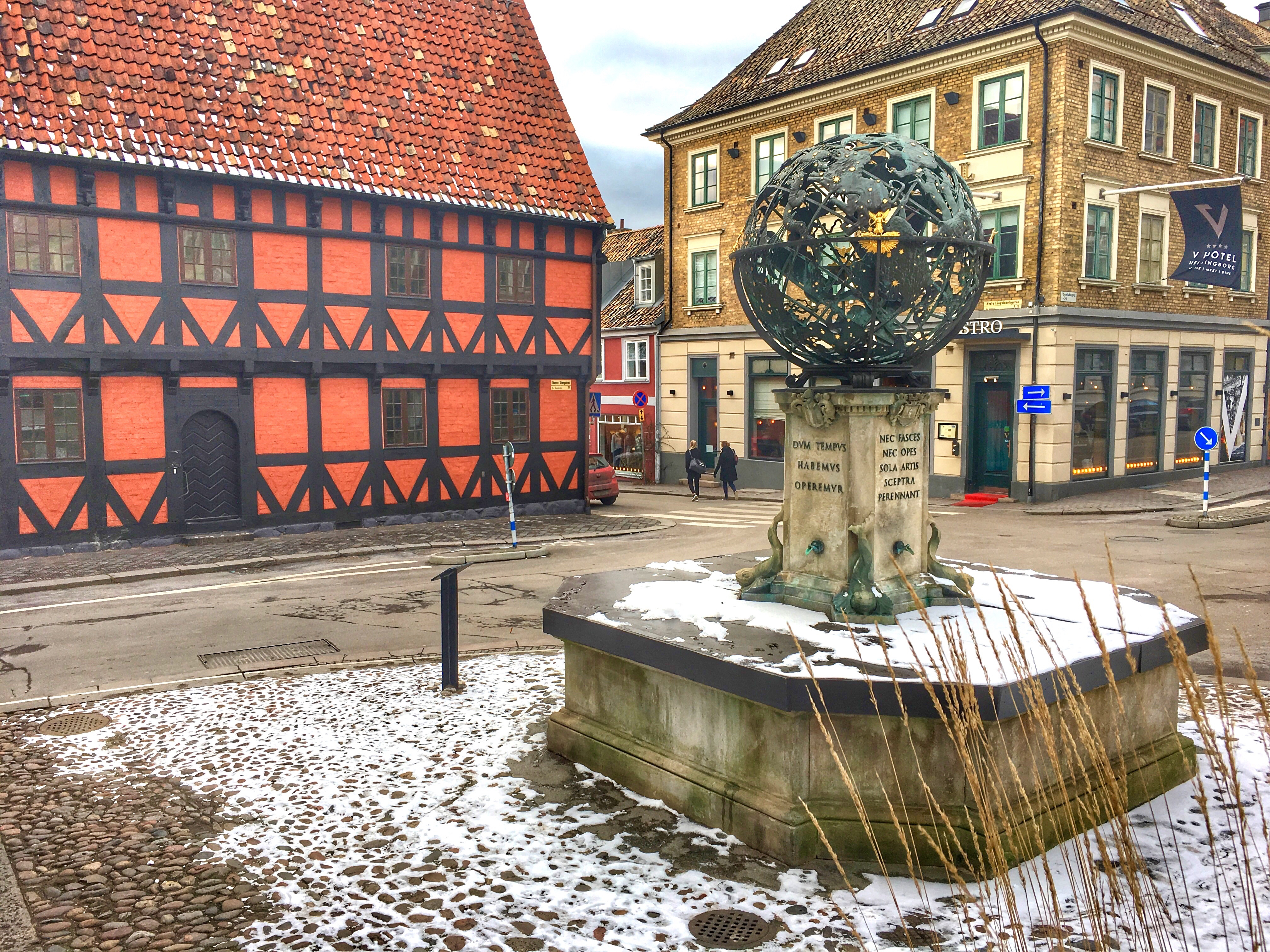 Tycho Braheplatsen, Helsingborg